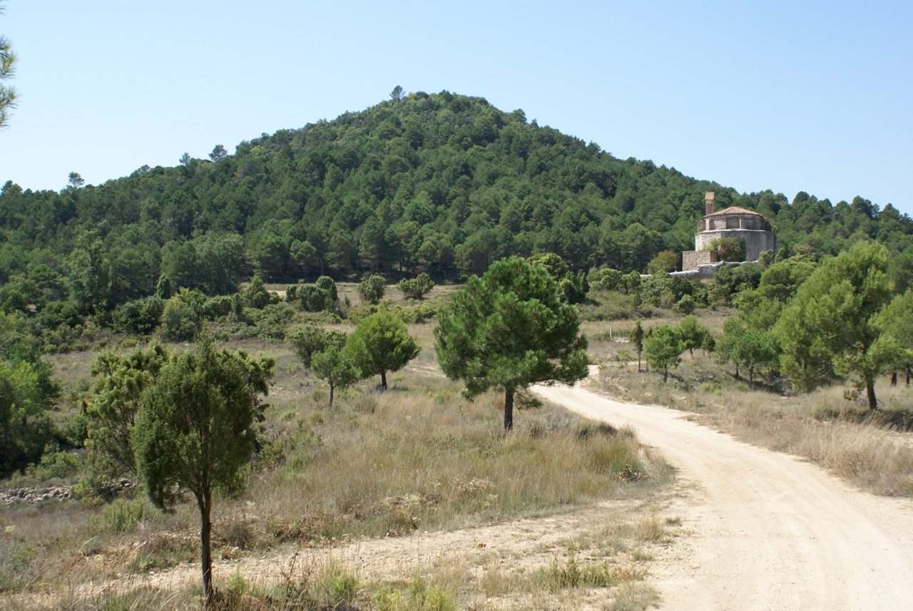 Muntanya Muntagut al municipi de Querol a la comarca de l'Alt Camp.